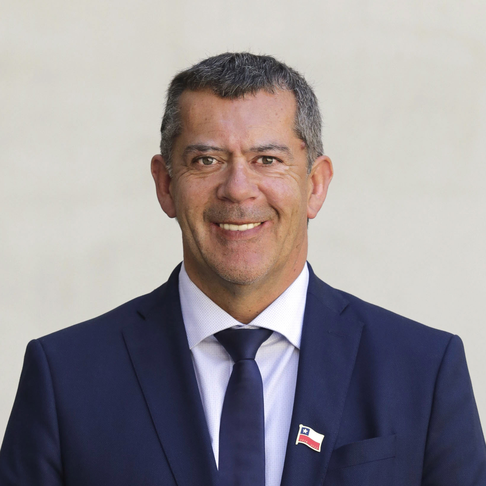 Foto oficial de Iván Cisternas Tapia